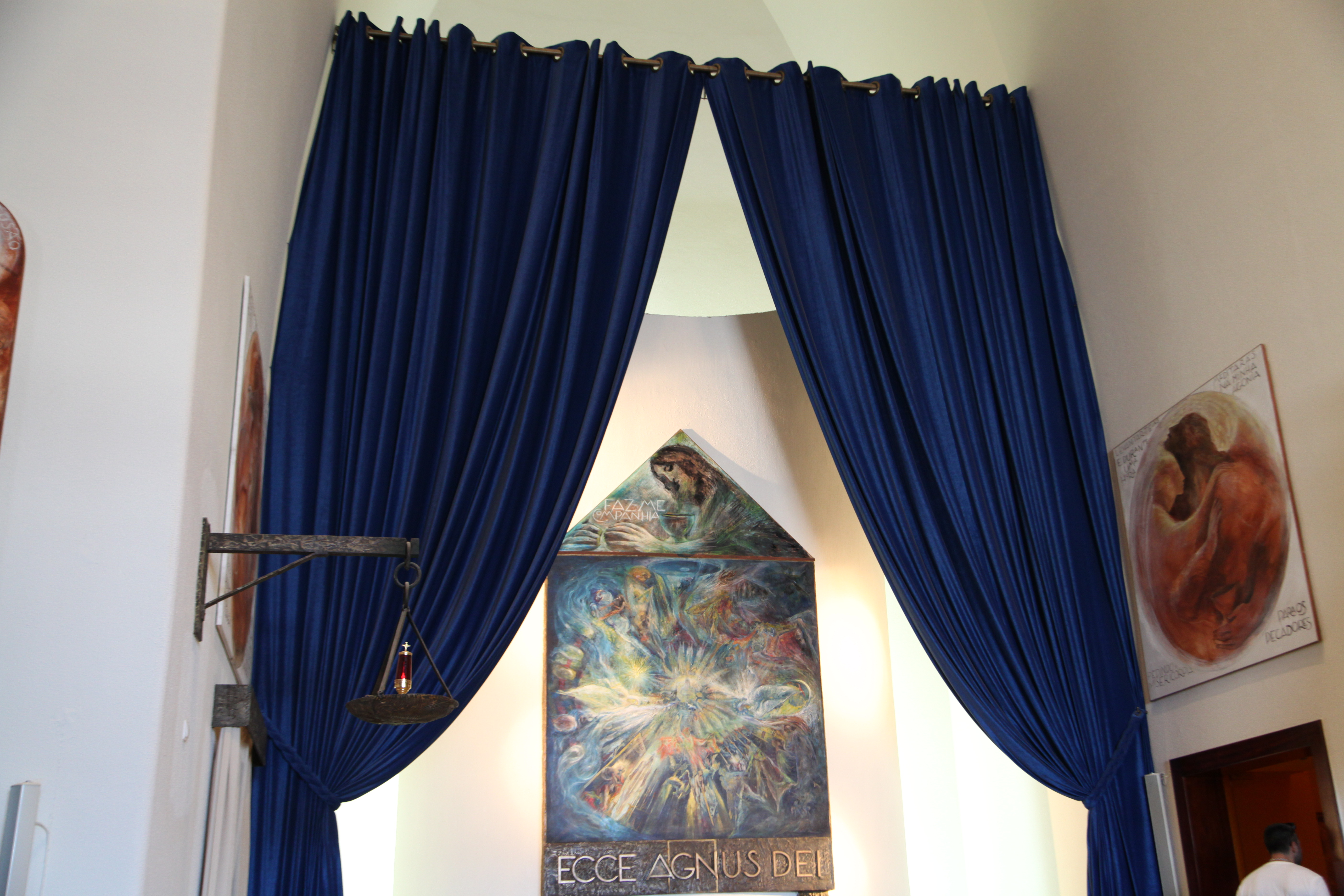 Lisbonne